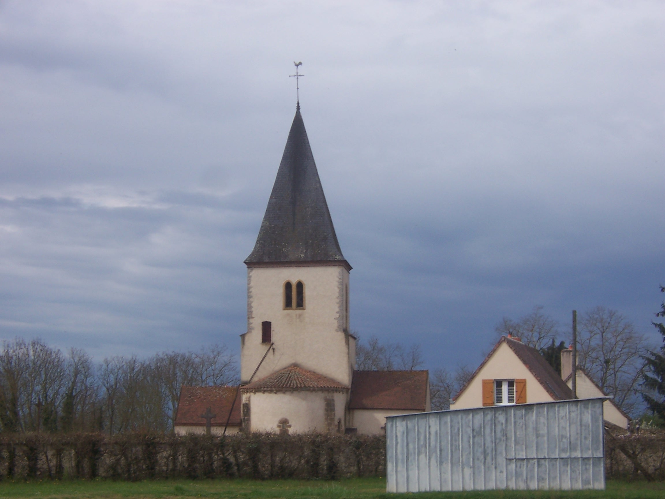 Eglise de Saint-Aubin-sur-Loire